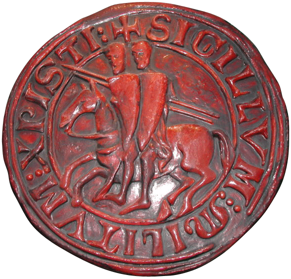 Kopie eines Siegels der Tempelritter in einer Ausstellung in Prag